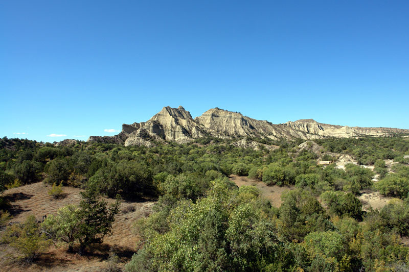 Vashlovani State Reserve